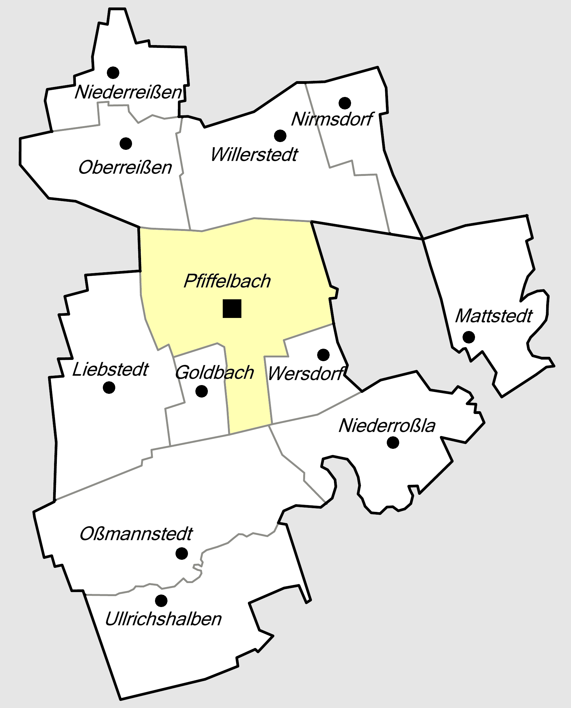 Lagekarte zu Pfiffelbach, Gemeinde Ilmtal-Weinstraße